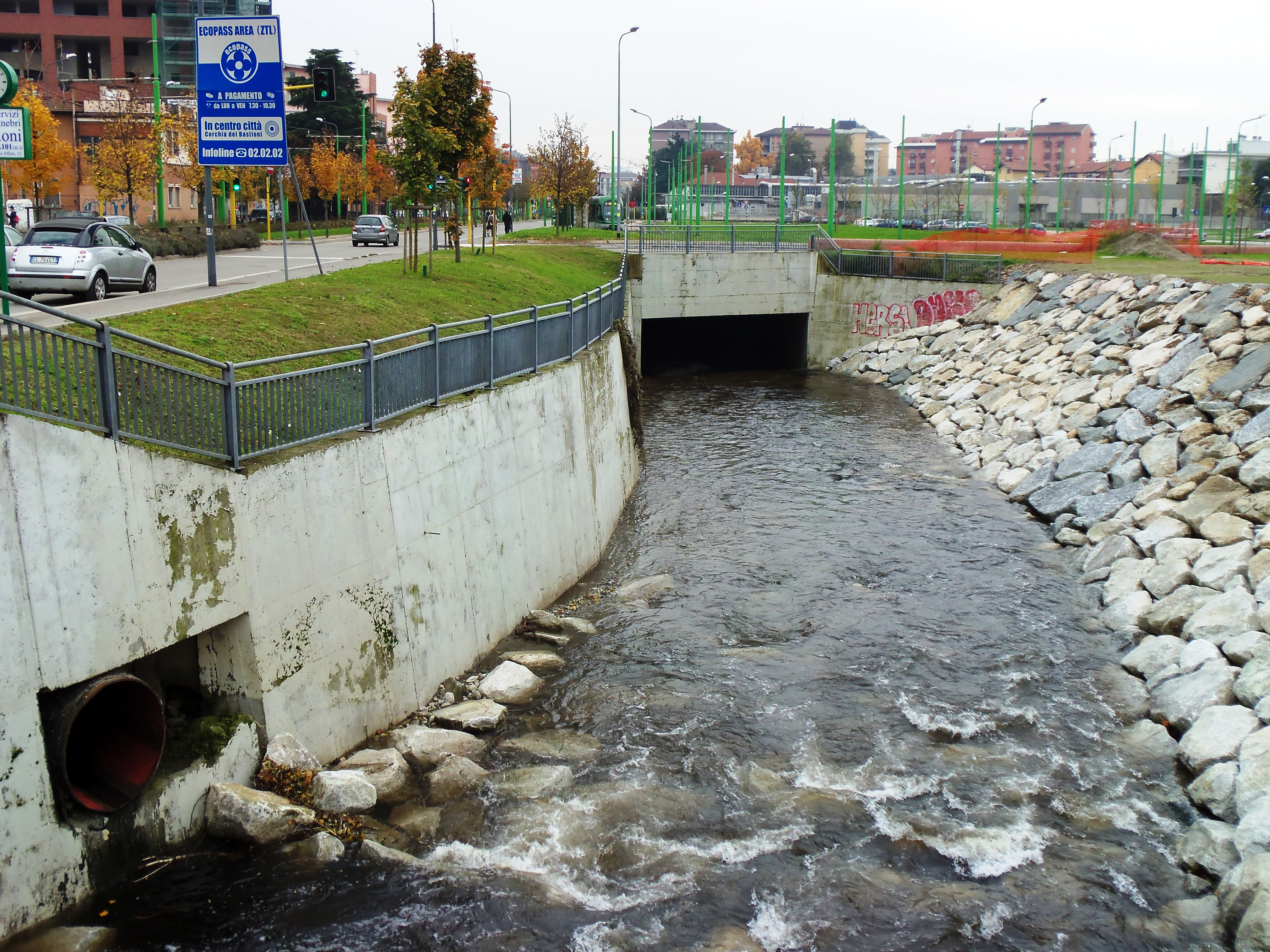 Fiume Seveso: entrando a Milano (viale Aldo Moro) il fiume percorre sottoterra il suo ultimo tratto